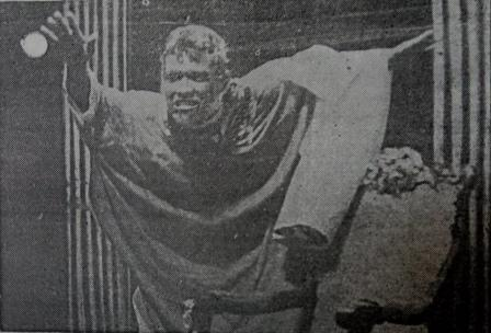 Saat berperan dalam pementasan Kematian Oddysseus